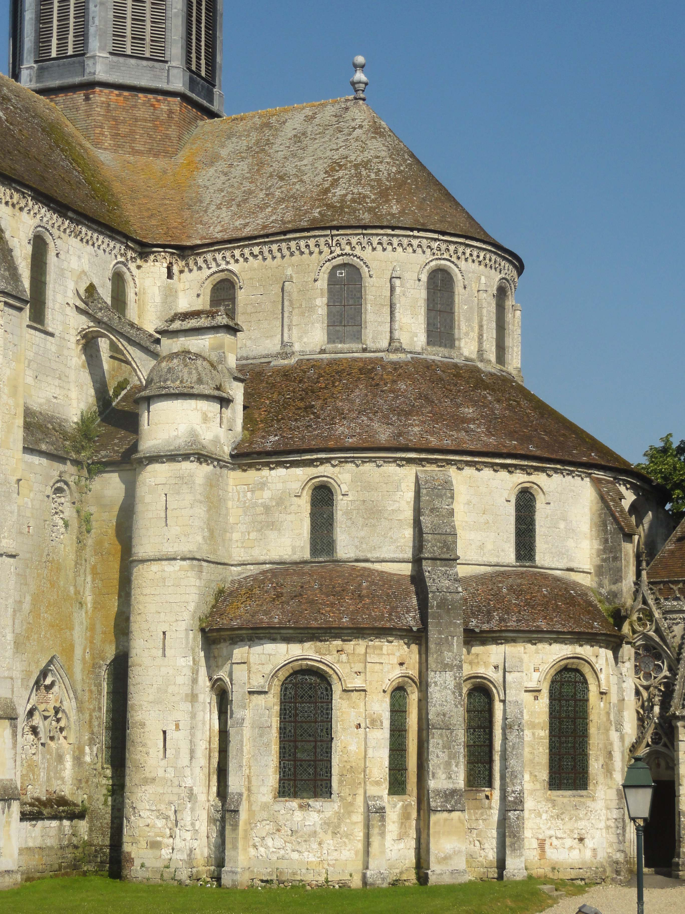 Église abbatiale Saint-Germer de l'ancienne abbaye Saint-Germer-de-Fly - voir le titre du fichier.